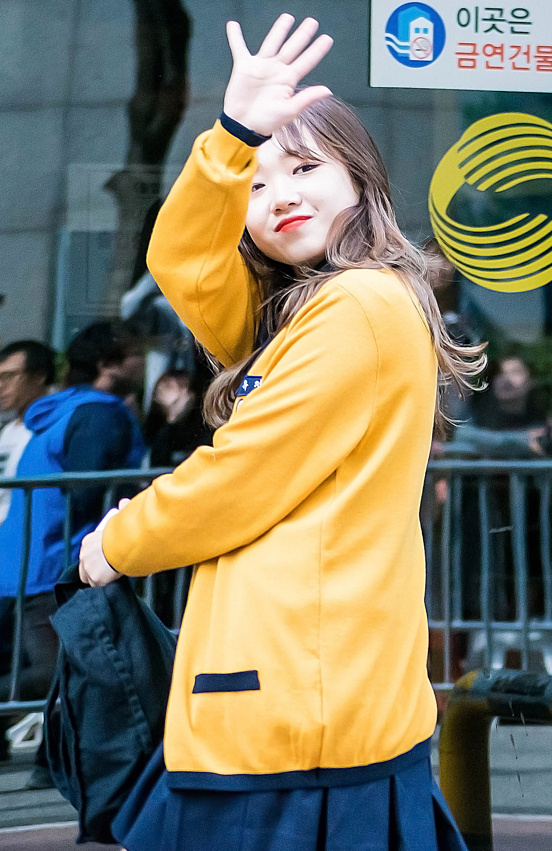 161021 뮤직뱅크 중간퇴근,중간출근길 아이오아이 직찍